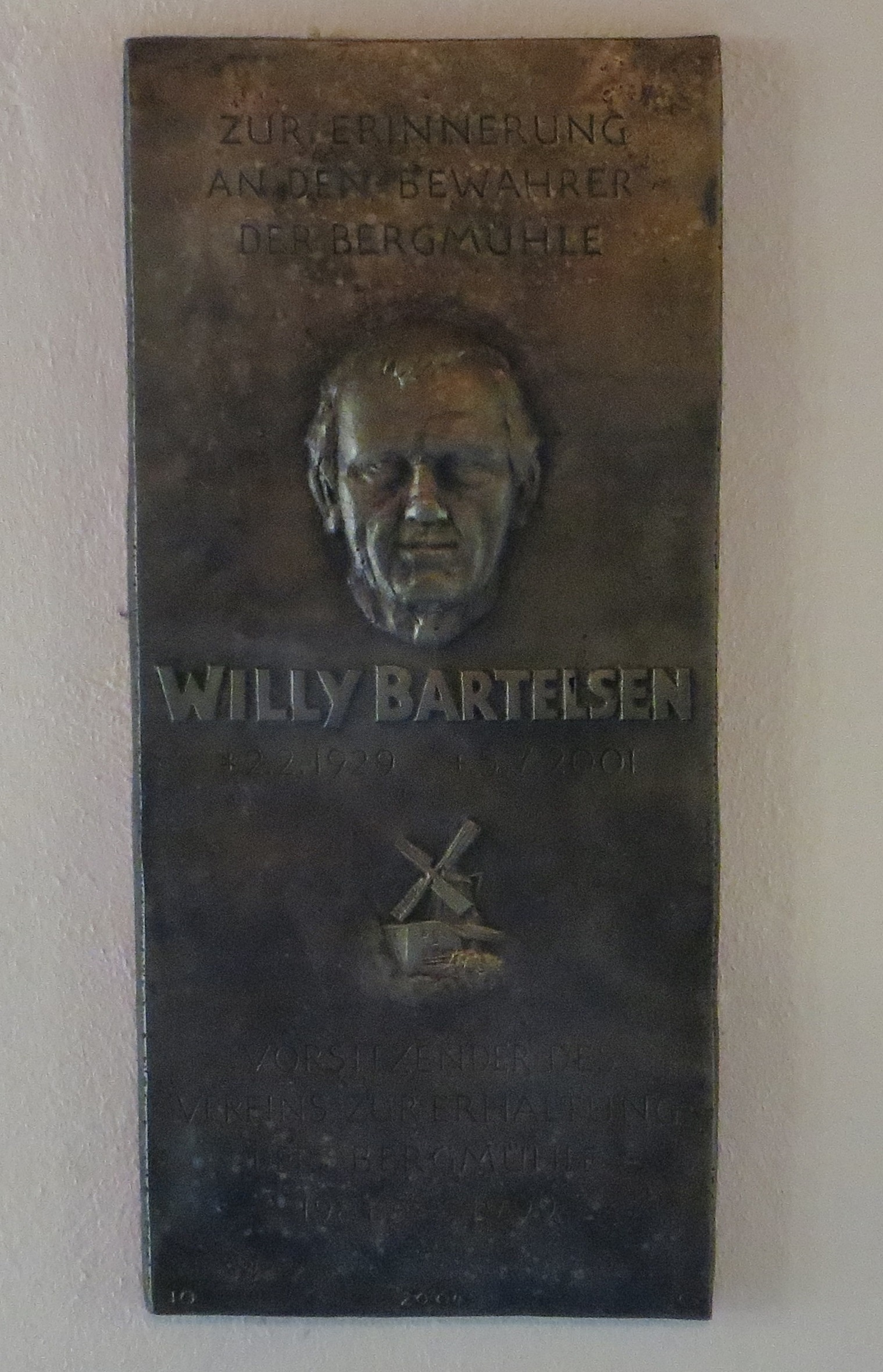 Willy Bartelsen Relief in der Bergmühle, Flensburg (2016)